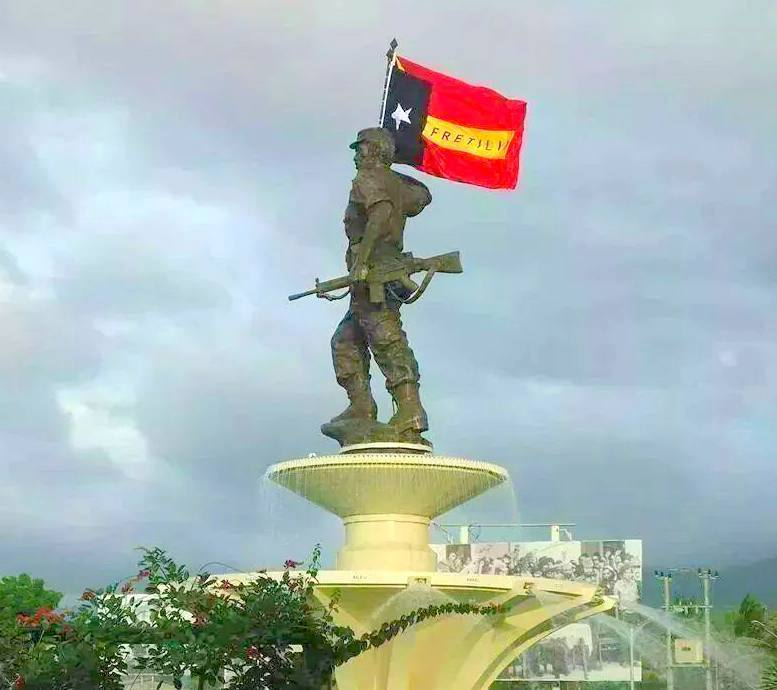 Dili